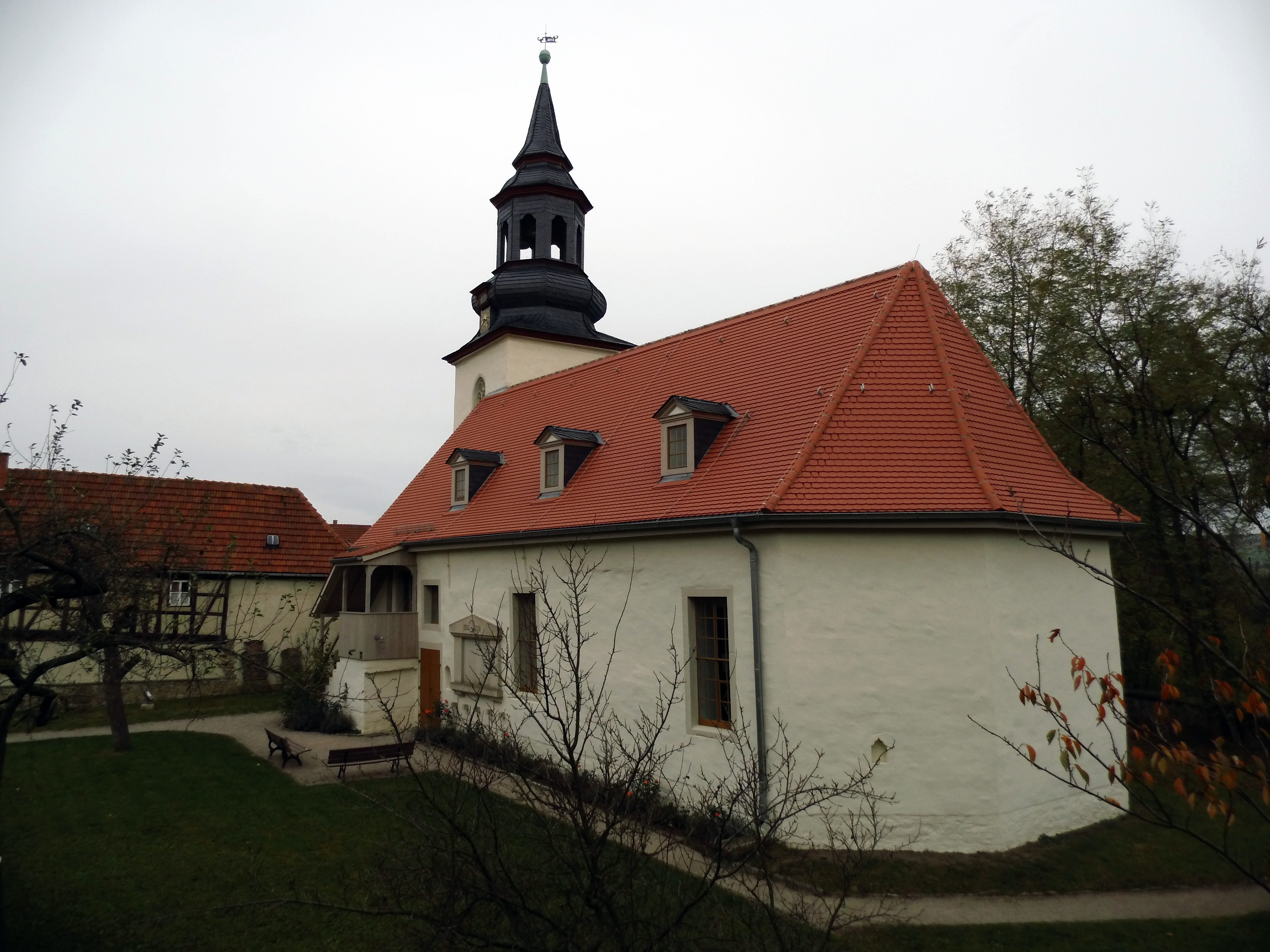 Die Kirche in Tiefurt - Blick aus Richtung Kammergut. Foto: Holger Zürch